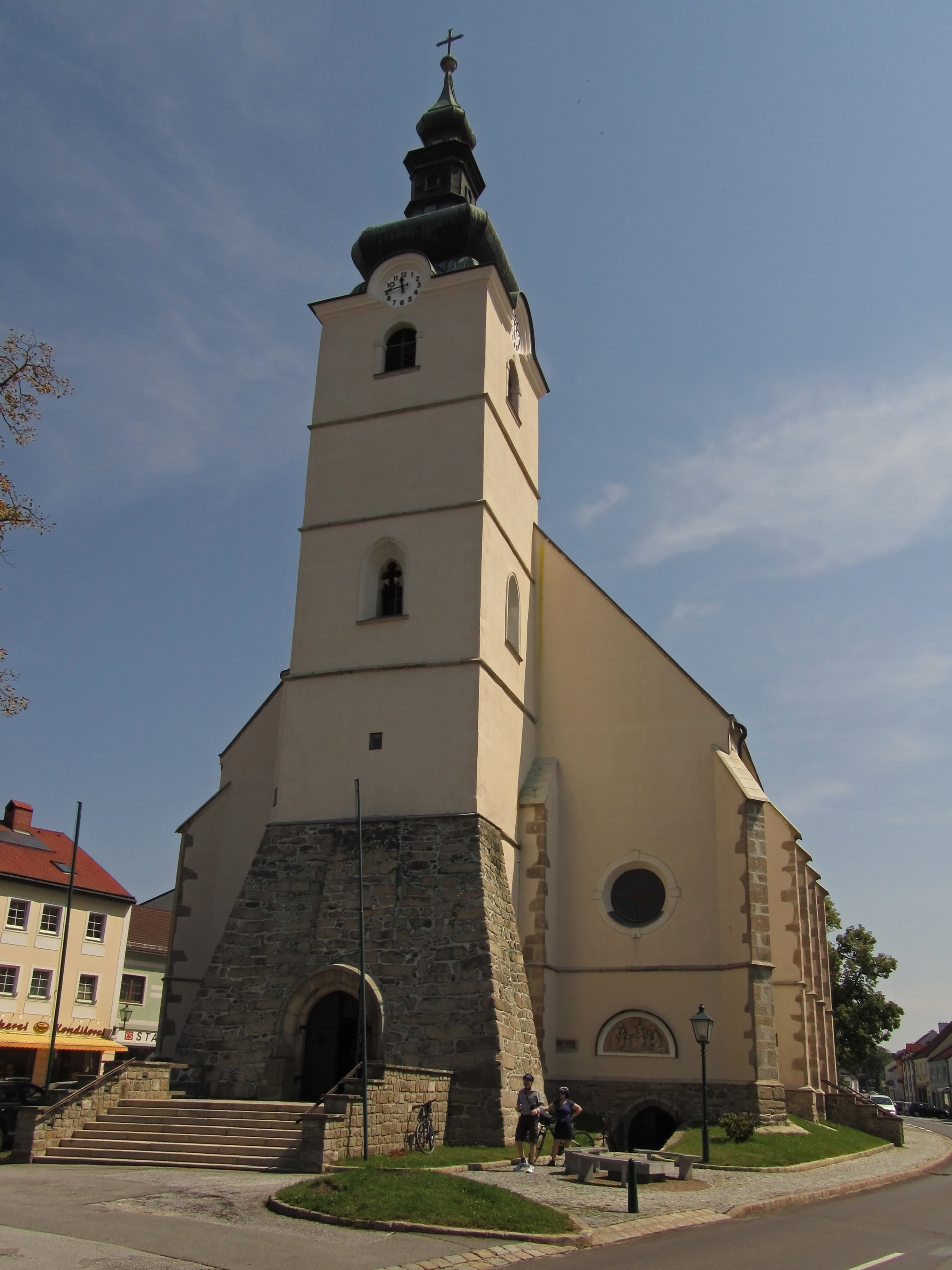 Die urkundlich erstmals 1233 erwähnte spätgotische Hallenkirche wurde 1685 barockisiert. Bei von 1898 bis 1901 erfolgten Renovierung erhielt sie eine neugotische Innenausstattung des Bildhauers Hans Greil.